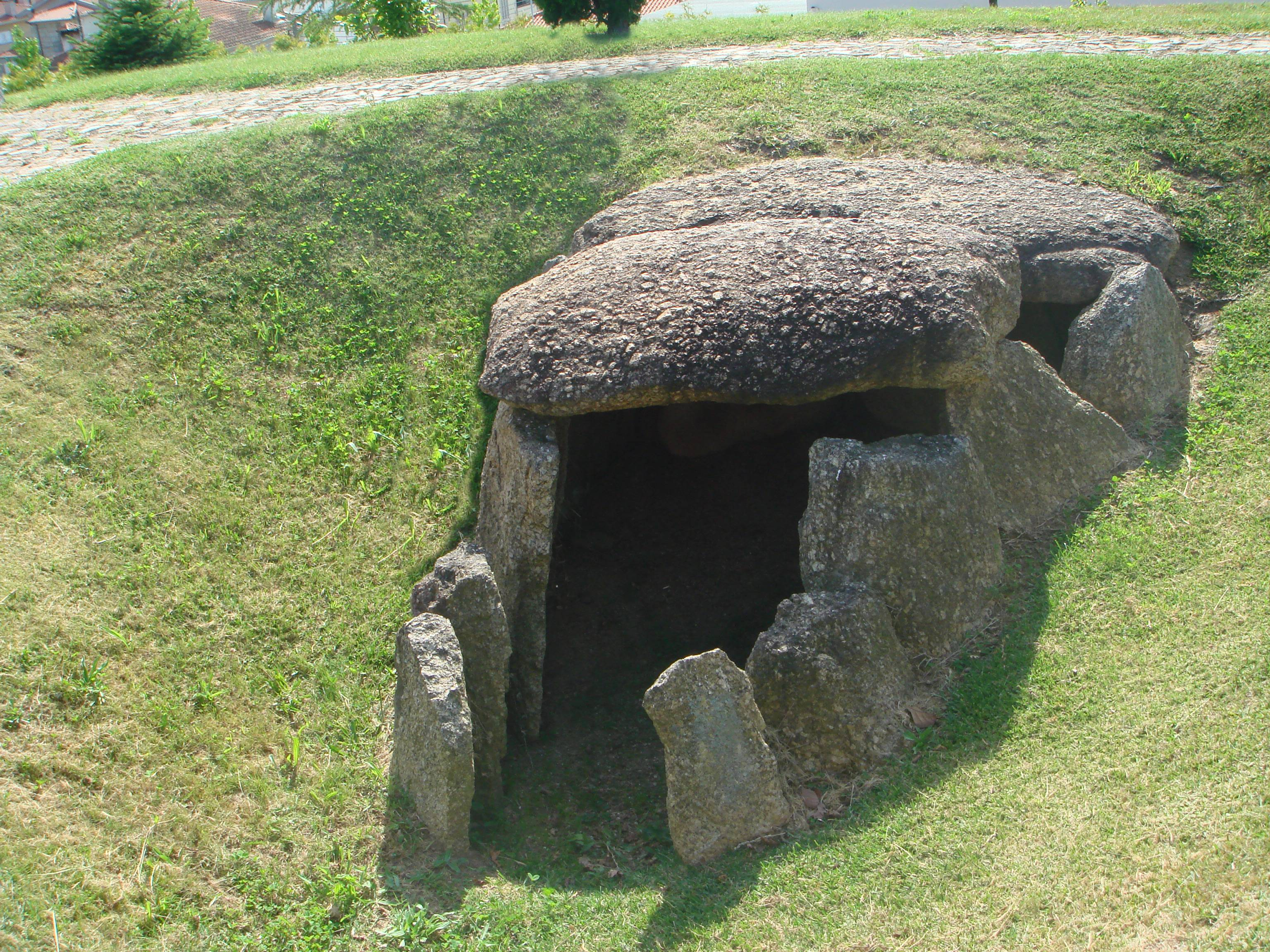 Mamoa de Lamas, Lamas, Braga, Portugal